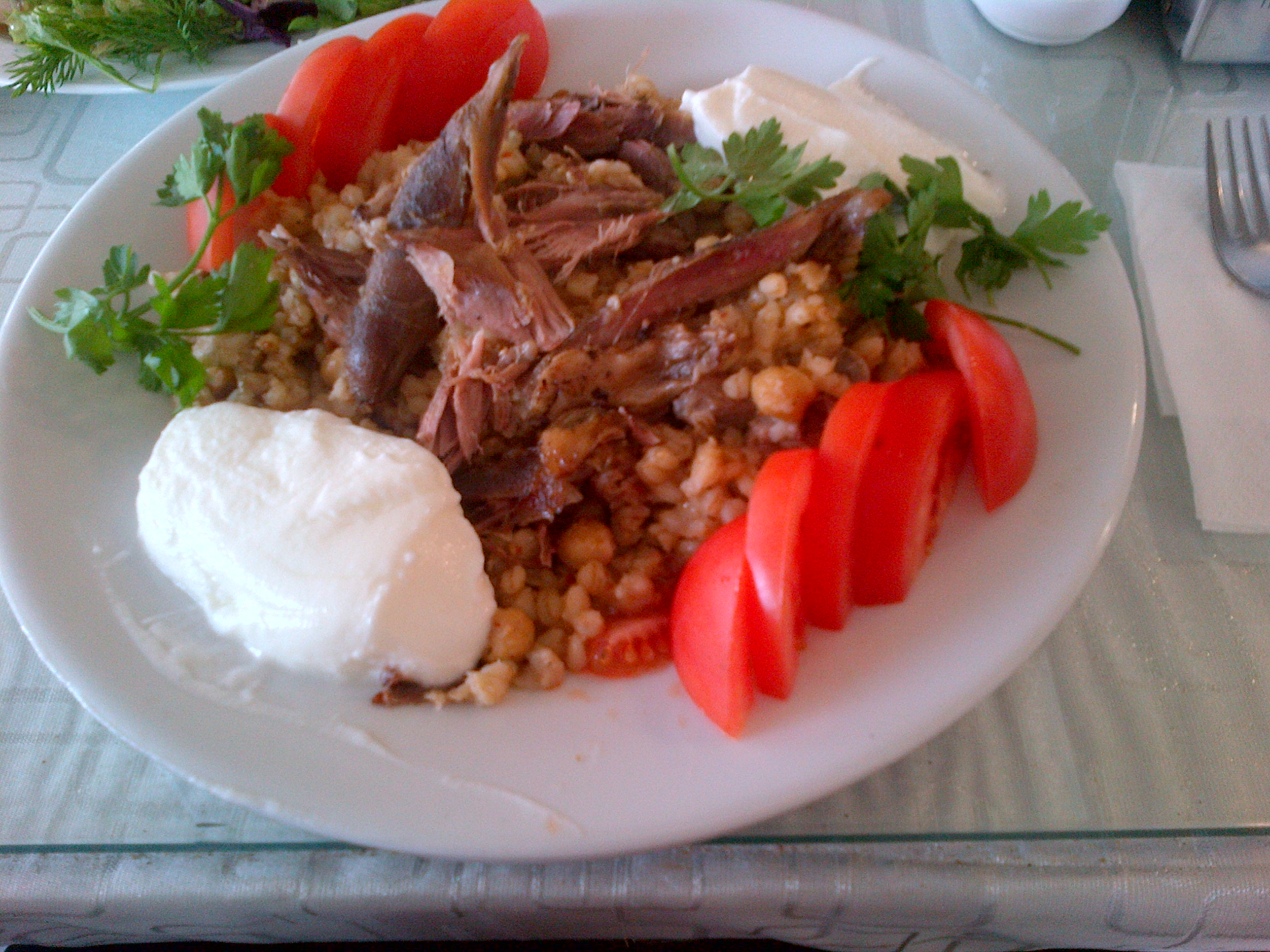 Tokat keşkeği es una version de la comida "turca keşkek" (keshkek) hecho con carne (de oveja, cordero o pollo) y granos de trigo. Al contrario del keşkek corriente, en esta version la carne y el trigo no se muelen y también lleva garbanzos.